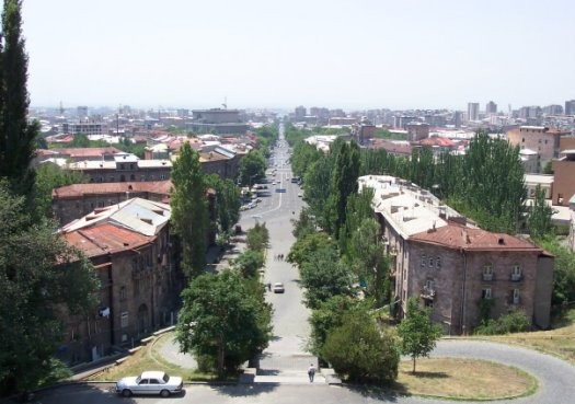 Avenue menant au Matenadaran, à Erevan